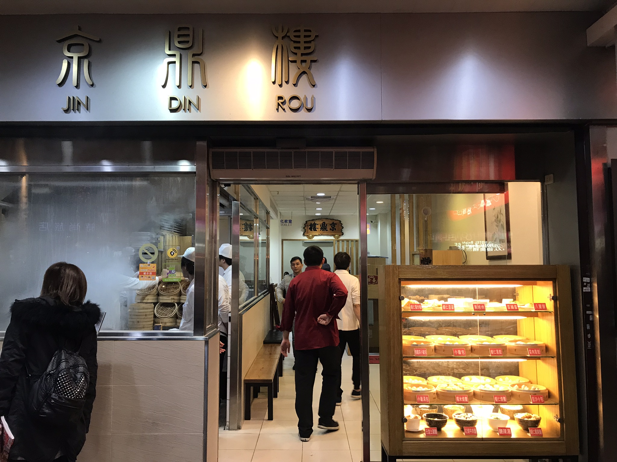 京鼎樓台湾本店